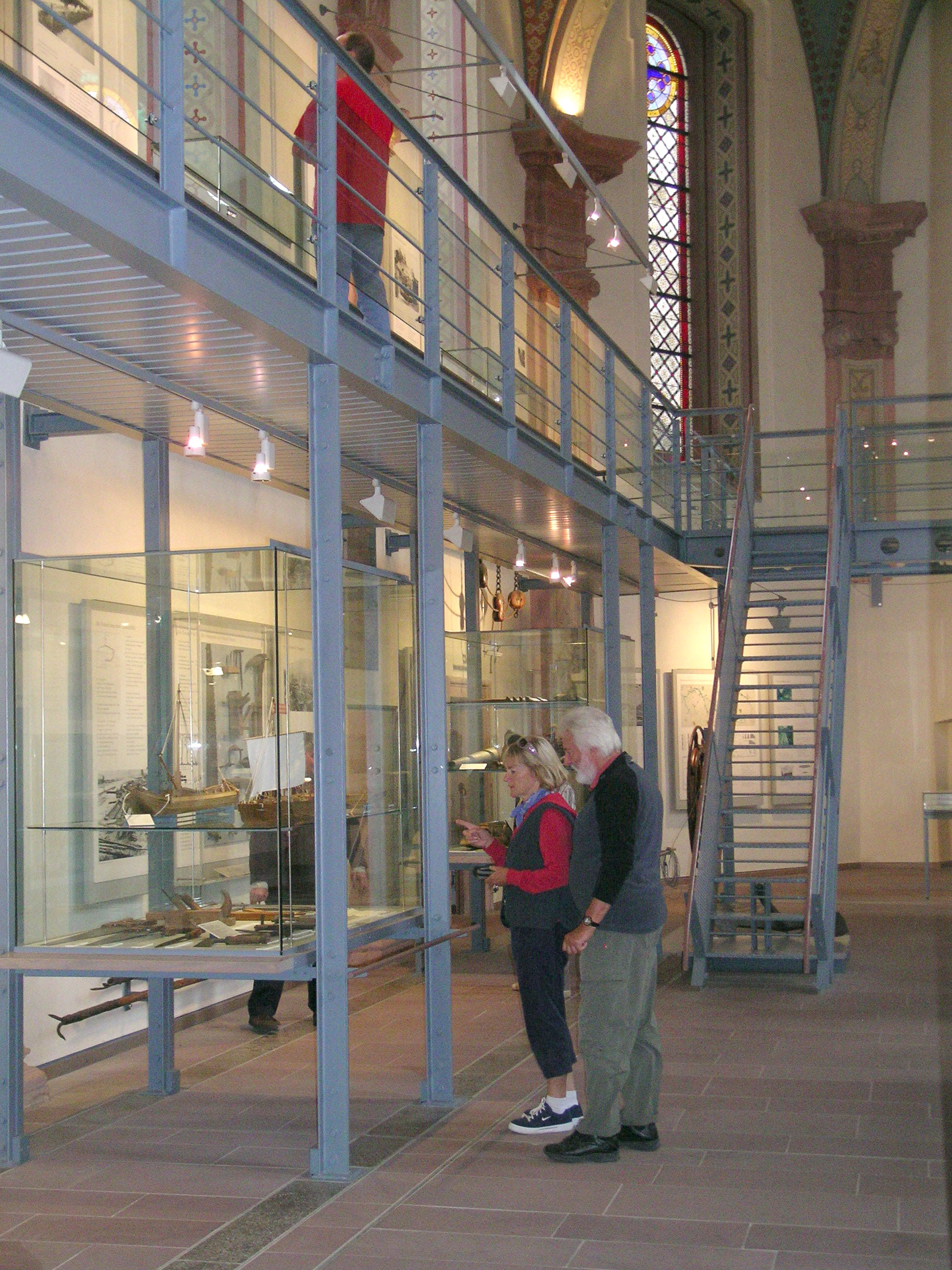 Innenansicht Schifffahrts- und Schiffbaumuseum Wörth am Main